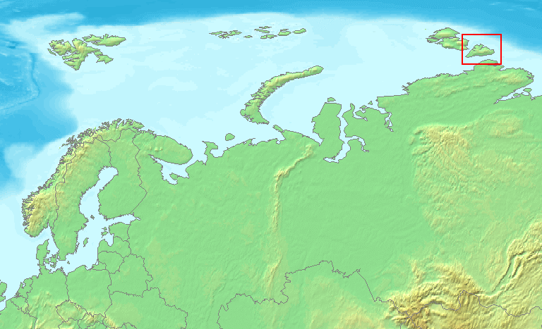 Severnaya_Zemlya